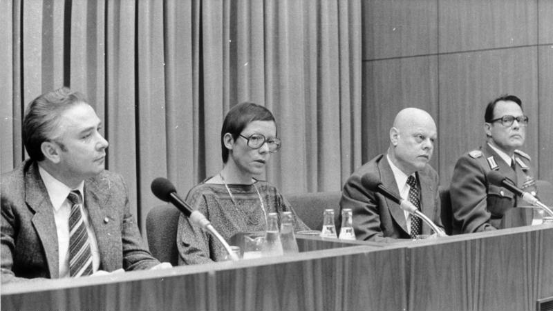 ADN-ZB/Mittelstädt/17.1.80/Berlin:Pressekonferenz Auf einer außerordentlich stark besuchten internationalen Pressekonferenz am Donnerstag in Berlin legte die ehemalige Assistentin des Direktors für Ratsoperationen des NATO-Generalsekretariats Ursel Lorenzen in einer längeren Erklärung dokumentarische Beweise zur friedensgefährdenden Strategie der NATO vor. Präsidium v.l.n.r.: Prof. Max Schmidt; Ursel Lorenzen, Prof. Dr. Stefan Doernberg, Oberst Prof.Dr. Albrecht Charisius.